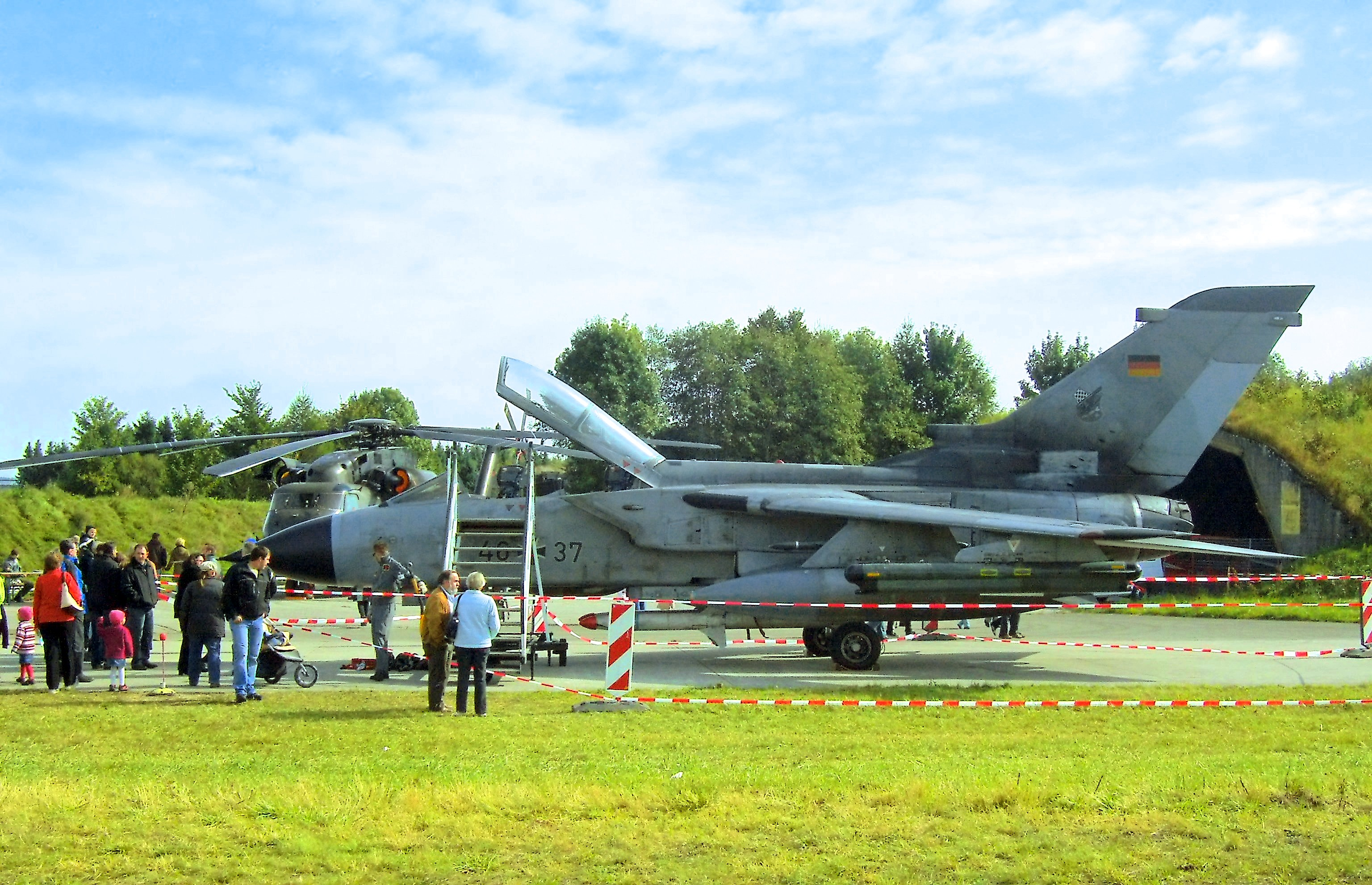 Tag der offenen Tür Allgäu Airport 2008 - Tornado ECR.